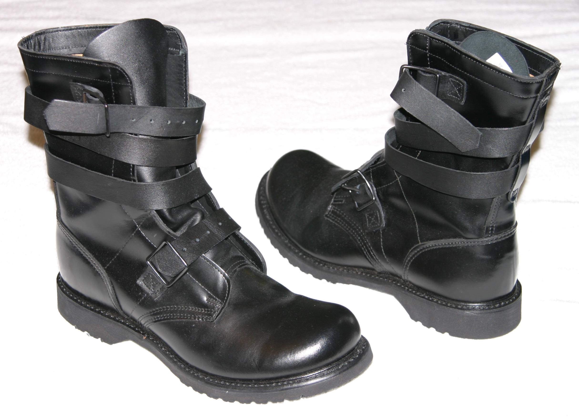 HH Brand tanker boots.